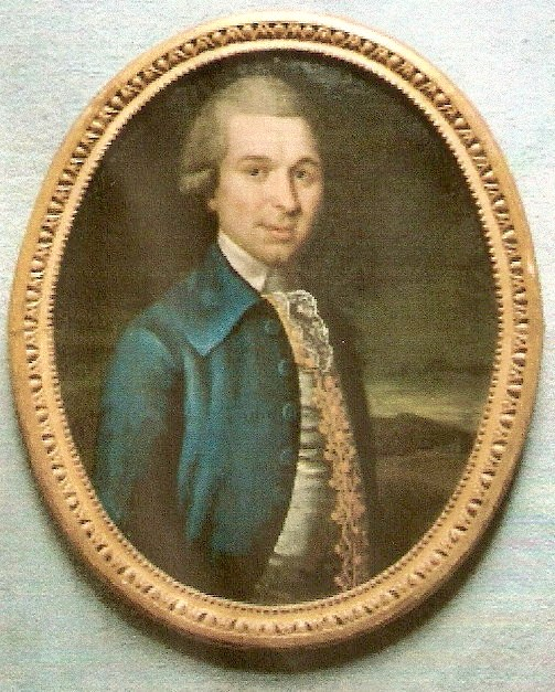 Scan eines Porträts aus dem Scheiblerschen Familienbuch